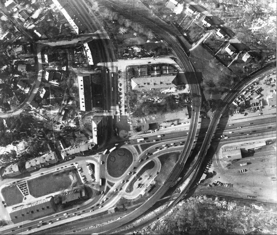 Flygbild över Drottningholmsvägen och Alviksplan